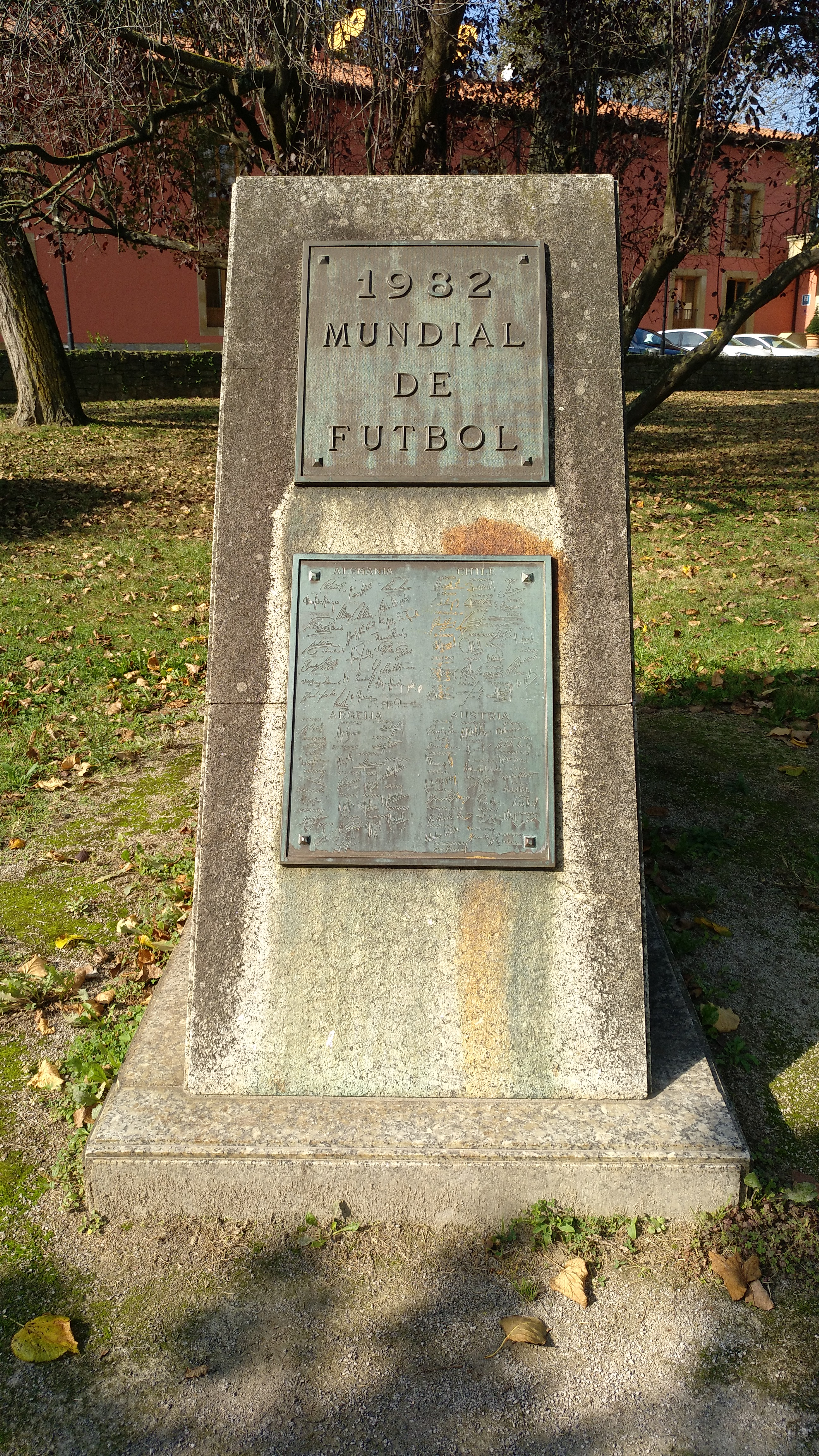 Monolito y placa conmemorativos del Mundial 1982, en los aledaños del estadio El Molinón de Gijón.